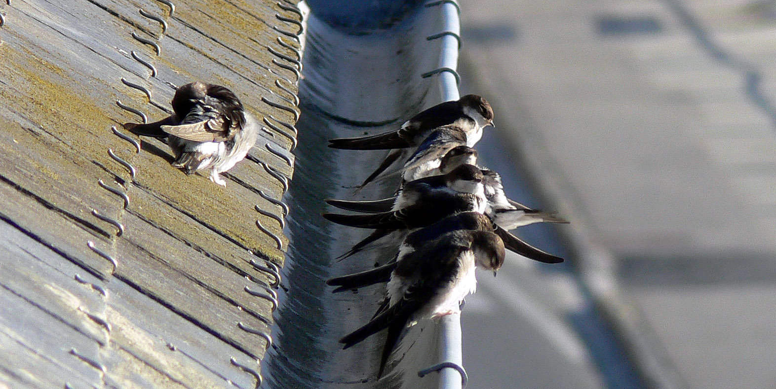 Hirondelle de fenêtre (Delichon urbica), toilettage du matin, avant envol. Photo prise à Morgat, commune de Crozon, en juillet 2006, en bord de mer à Morgat (Bretagne, France, Europe) Il s’agit d’une petite colonie de quelques dizaines de couples qui avait régressé puis disparu dans les années 1980-1990, remplacée par des martinets. Cette colonie installée au 4ème étage d’un ancien hôtel semble se reconstituer depuis les années 2000. Les nids sont construits face au soleil levant, constitués de sables et de morceaux de plantes marines (posidonies) prélevés sur la plage proche. Le toilettage est aussi peut-être le moment de se réchauffer au soleil et de se dégourdir les membres, les oiseaux ayant dormi serrés les uns contre les autres dans un nid très petit. remarque : Quelques hirondelles rustiques nichent au milieu des hirondelles de fenêtre.